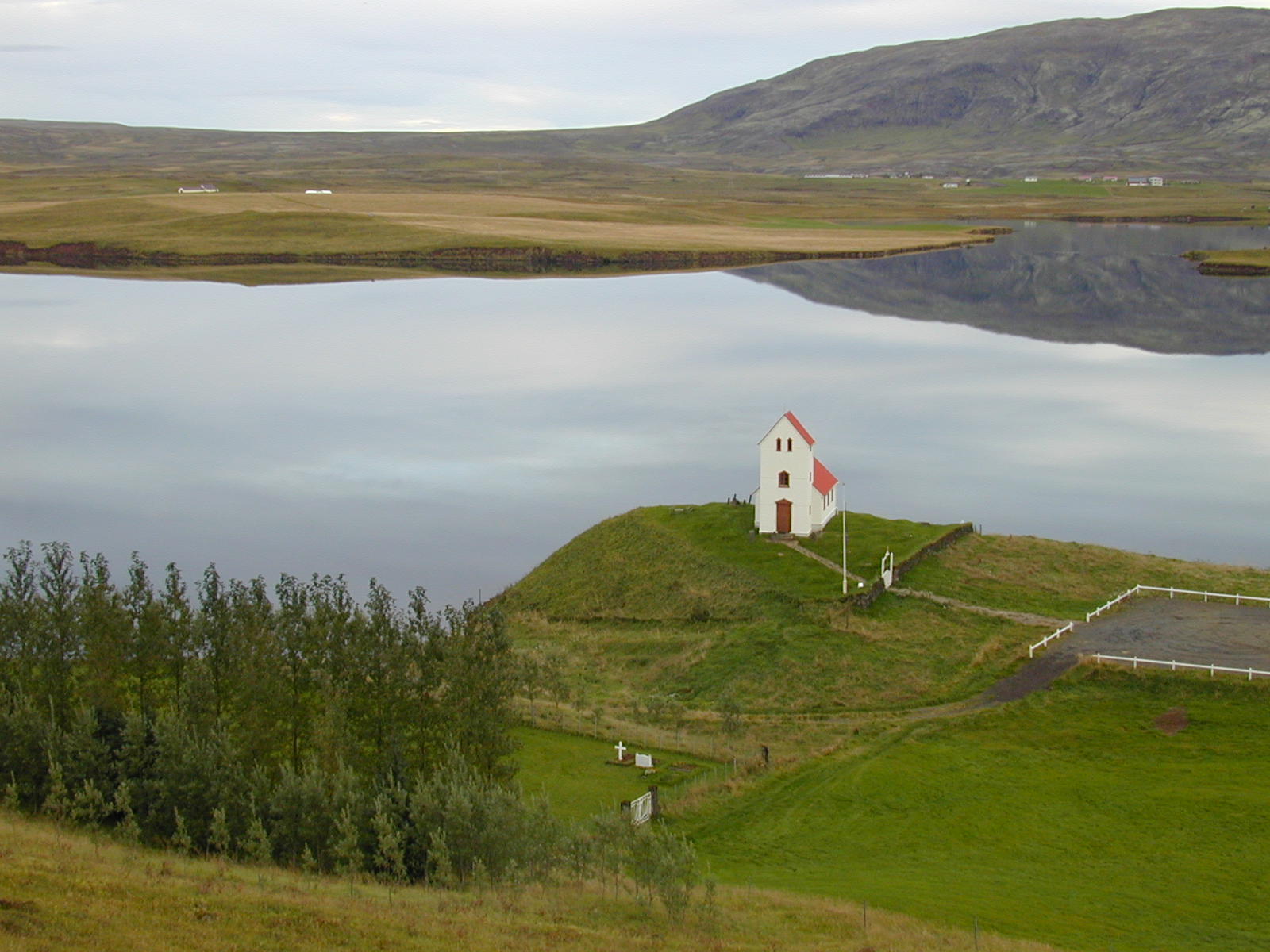 Einsame Kirche am Úlfljótsvatn